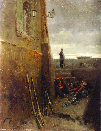 Baturro de guardia durante los Sitios de Zaragoza. Óleo sobre lienzo . 46 x 40 cm.